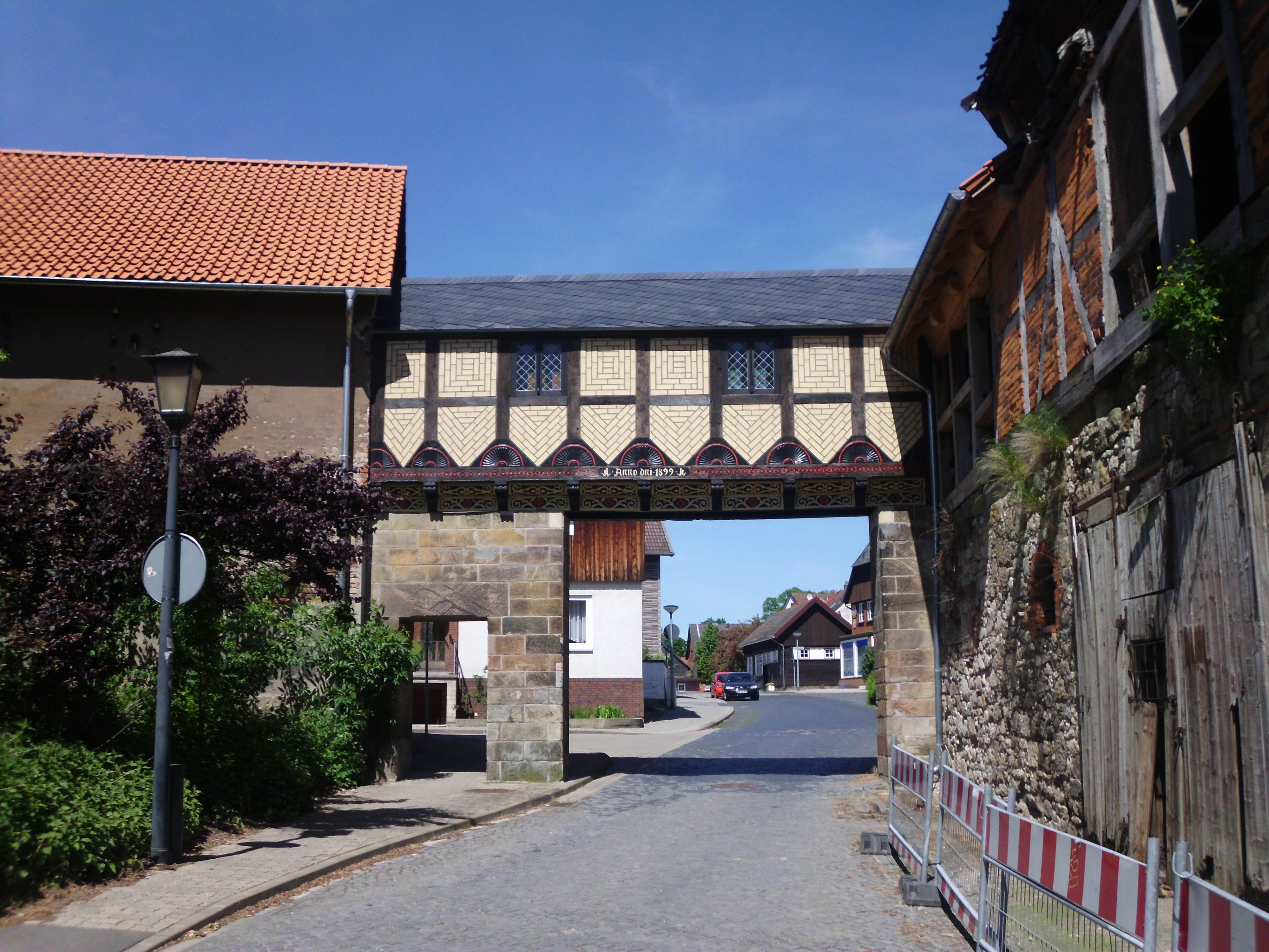 Korngang am Eingang des Gutshofs in Ringelheim